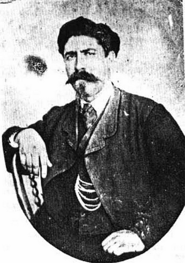 Dr. Cav. Salvatore Ciotta, 1837-1896, Sindaco di Campobello di Licata (Ag) dal 1871 al 1878